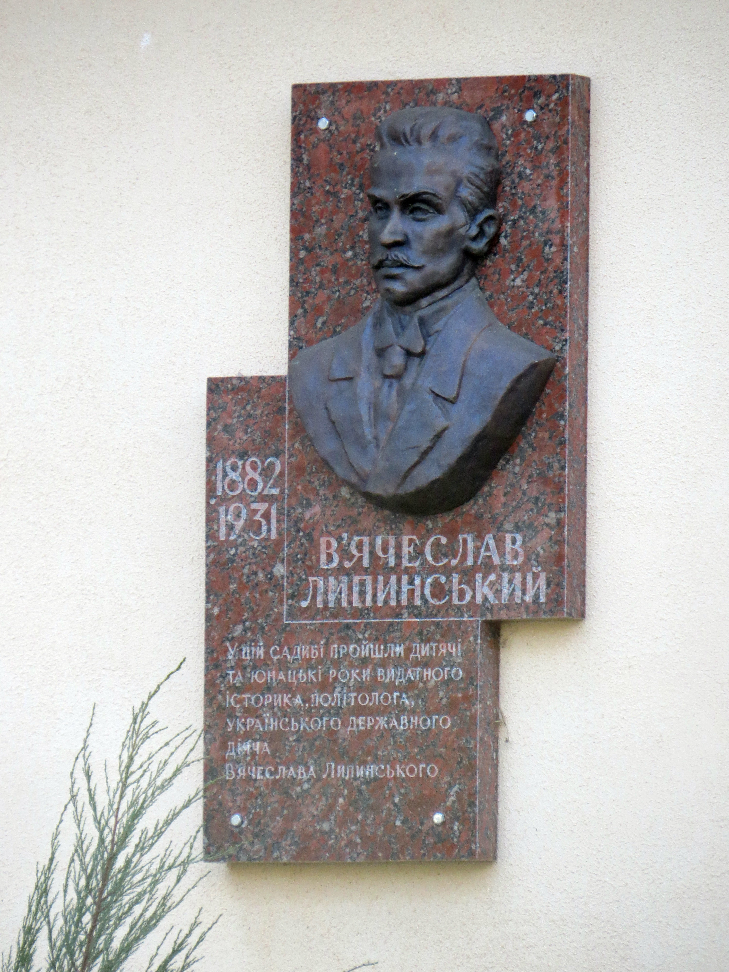 Палац родини Липинських (мур.) (поч. 19 ст. - 1882 рік) - меморіальна дошка - с.Затурці (вул. 1 Травня, 75) Локачинський район Волинська область Україна